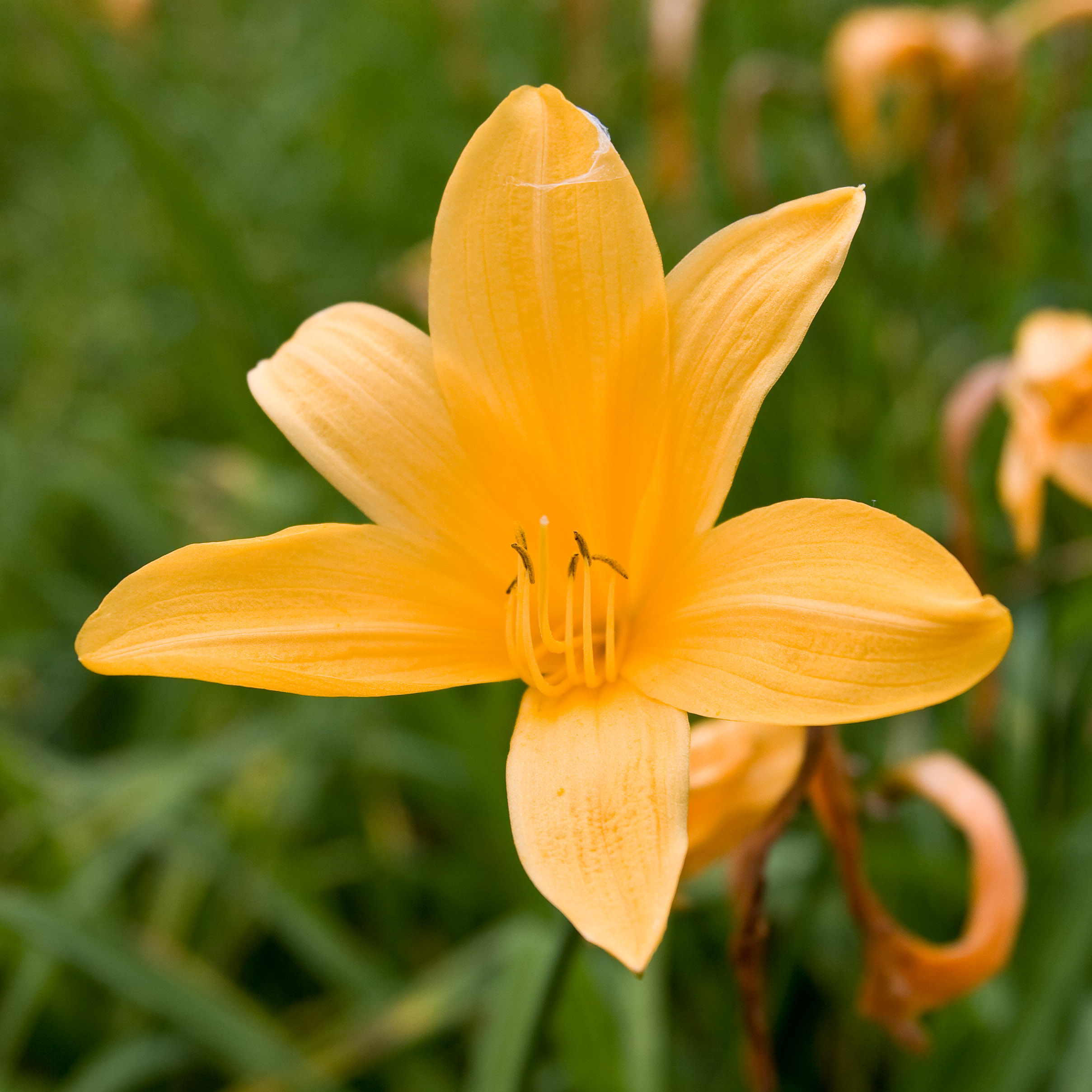 ニッコウキスゲ (学名:Hemerocallis dumortieri var. esculenta )